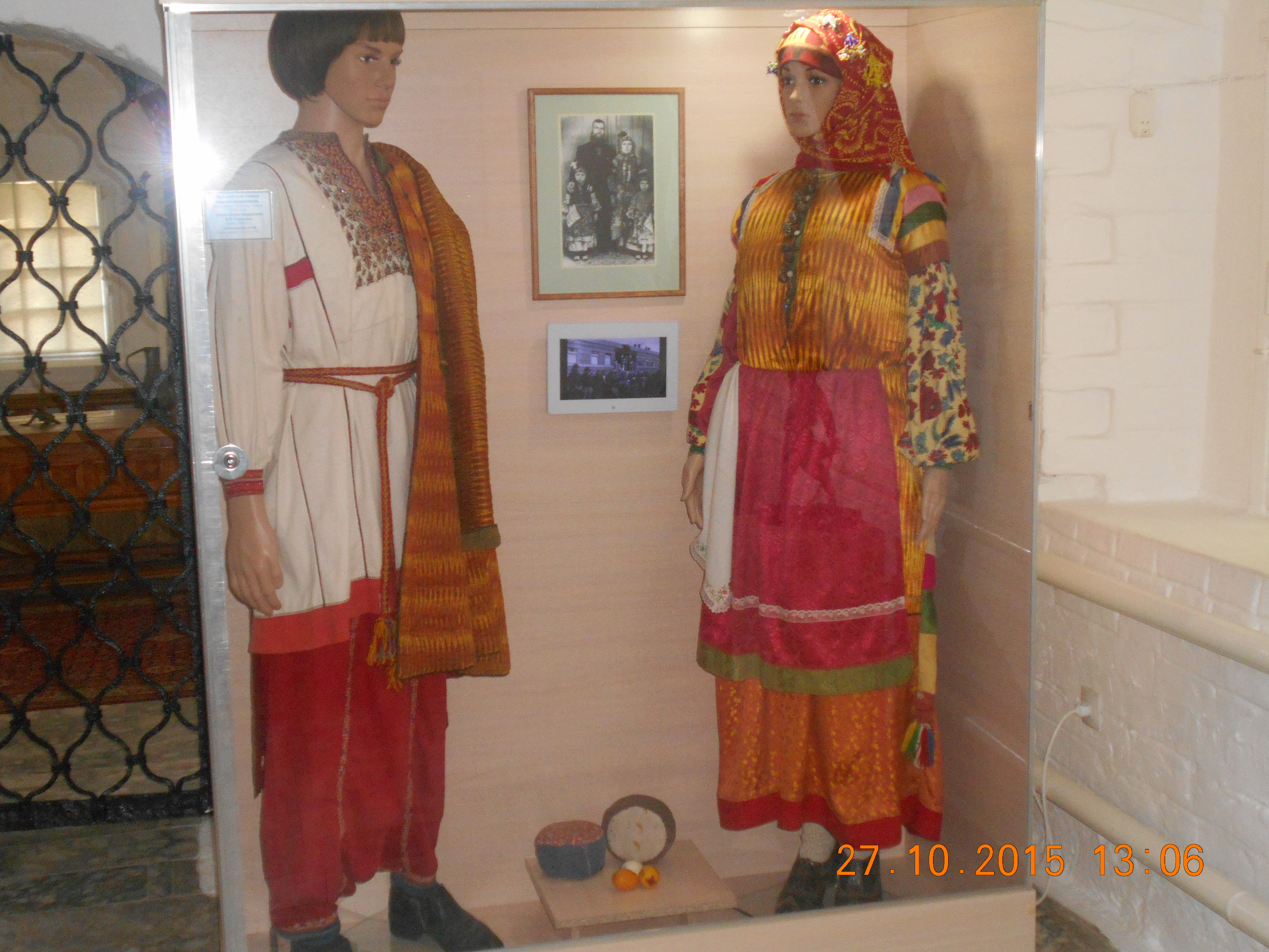 Музей.